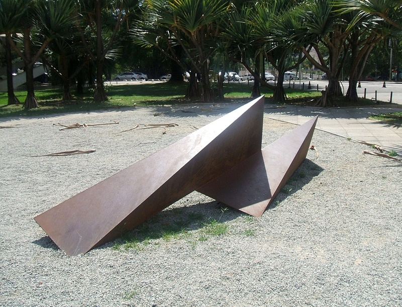 Sérvulo Esmeraldo - Tetraedros, 1997. Aço corten, 70 x 450 x 70 cm. Jardim de Esculturas, Acervo do Museu de Arte Moderna de São Paulo, Brasil.